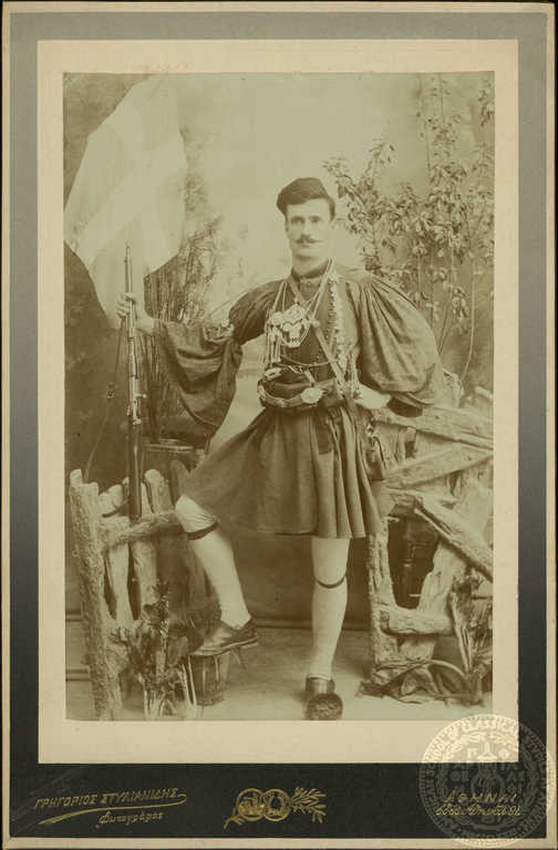 Андартският капитан от Влашка Блаца Христос Аргиракос с псевдоним Кицос Морикис